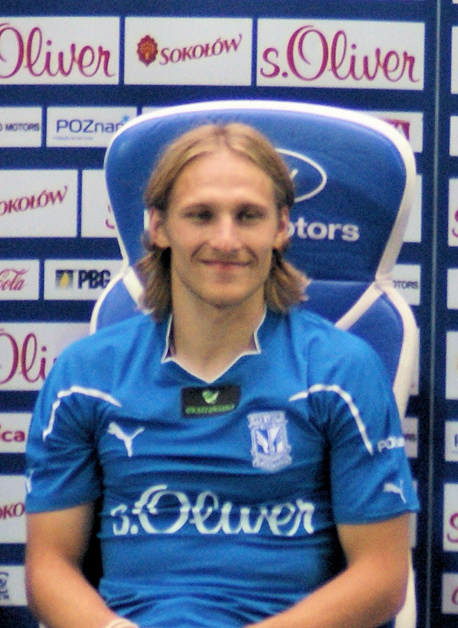 Siarhiej Krywiec - gracz Lecha Poznań - prezentacja piłkarzy na Stadionie Miejskim przed sezonem 2010/2011.